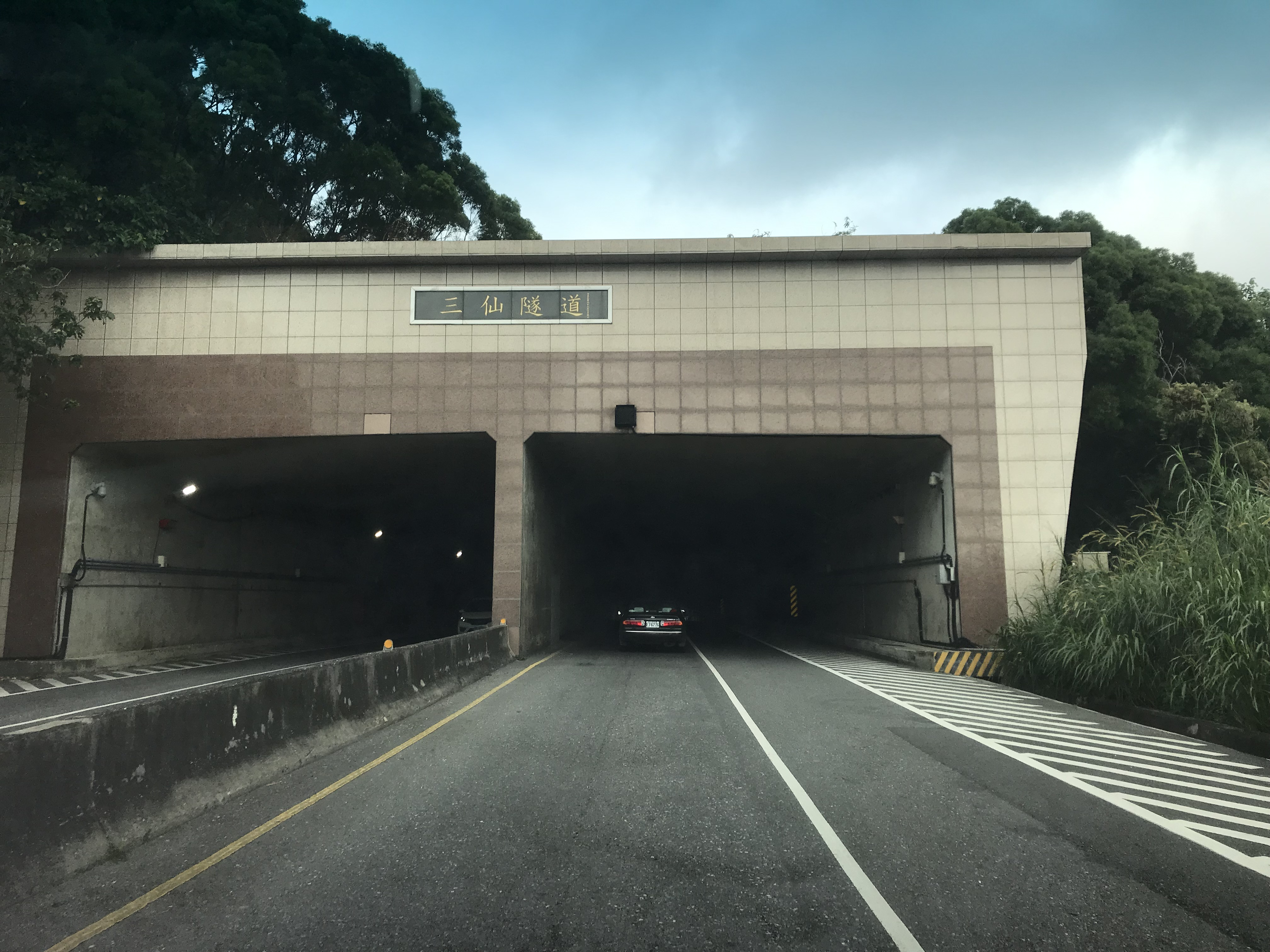 臺灣臺東縣成功鎮省道臺11線三仙隧道